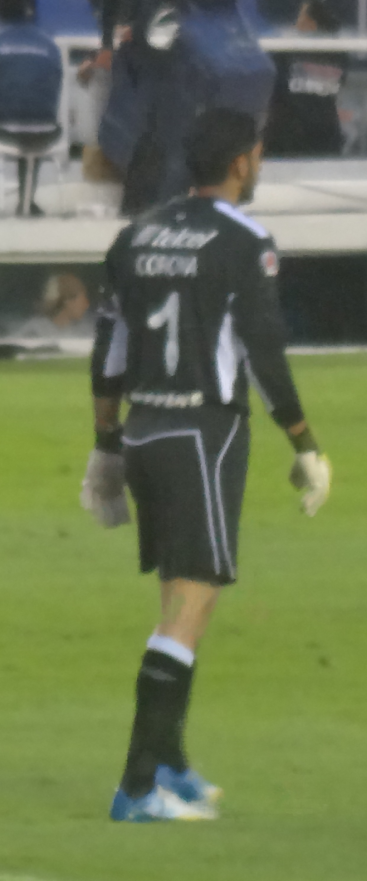 Jesus Corona en la Liga MX